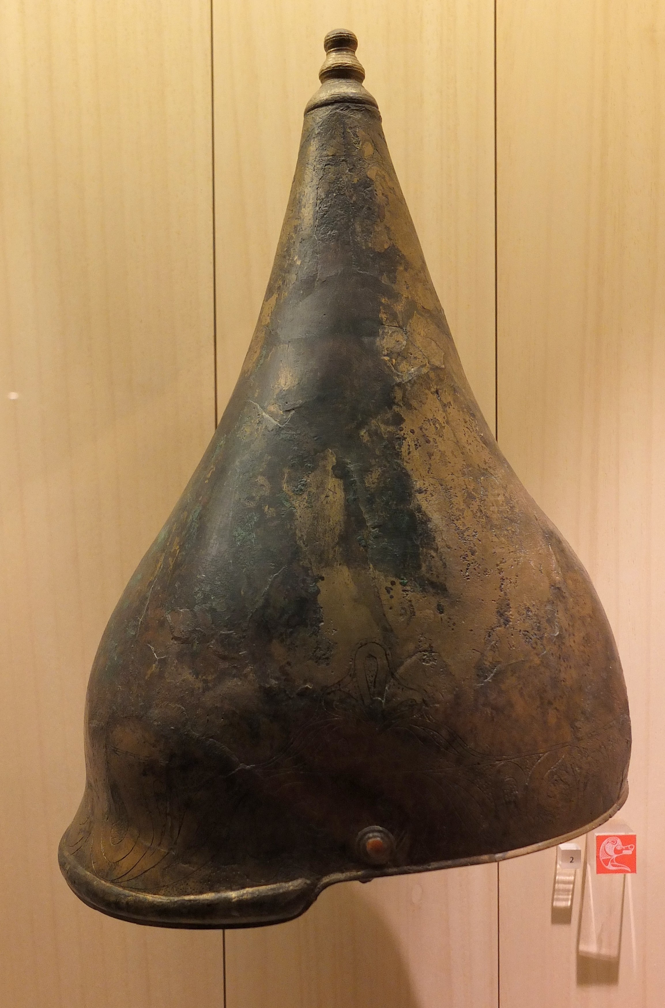 Casque gaulois (Ve siècle av-JC.), trouvé dans la tombe à char de Berru (Marne), bronze - Musée d'archéologie nationale de Saint-Germain-en-Laye (Yvelines). N°inv : MAN 20583